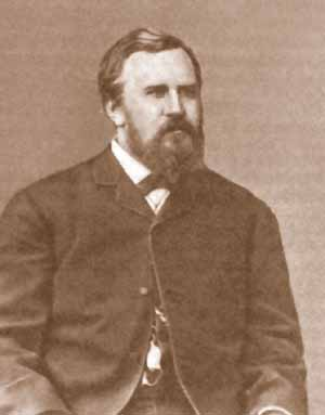 Майков, Леонид Николаевич